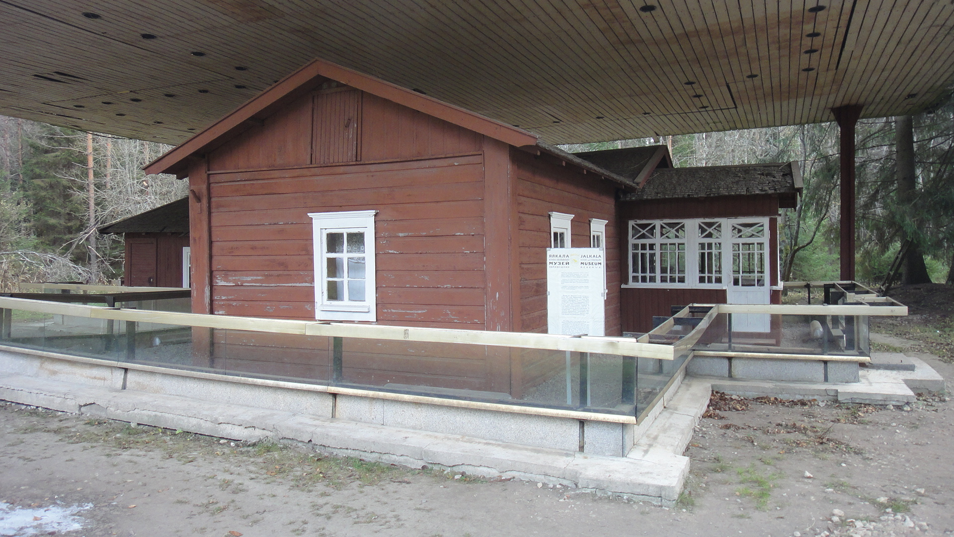 Дом Парвиайнена